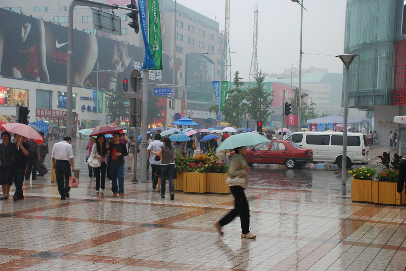 雨中八面槽